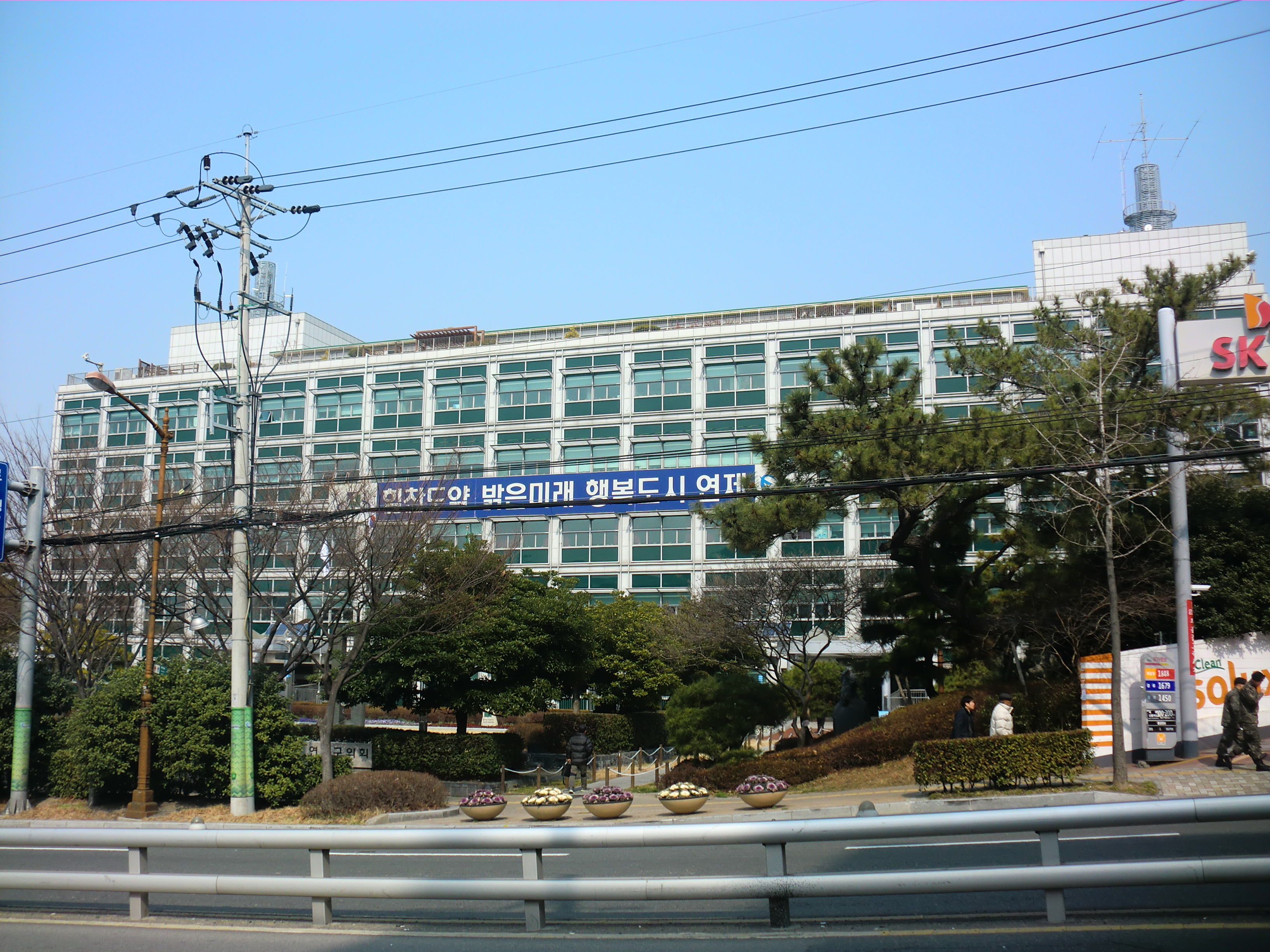 부산광역시 연제구에 있는 연제구청